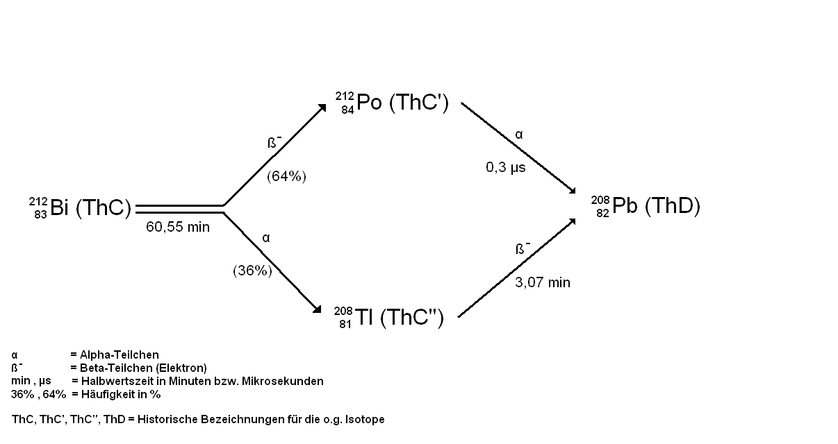 Dualer Kernzerfall des Bismut-Isotops Bi-212